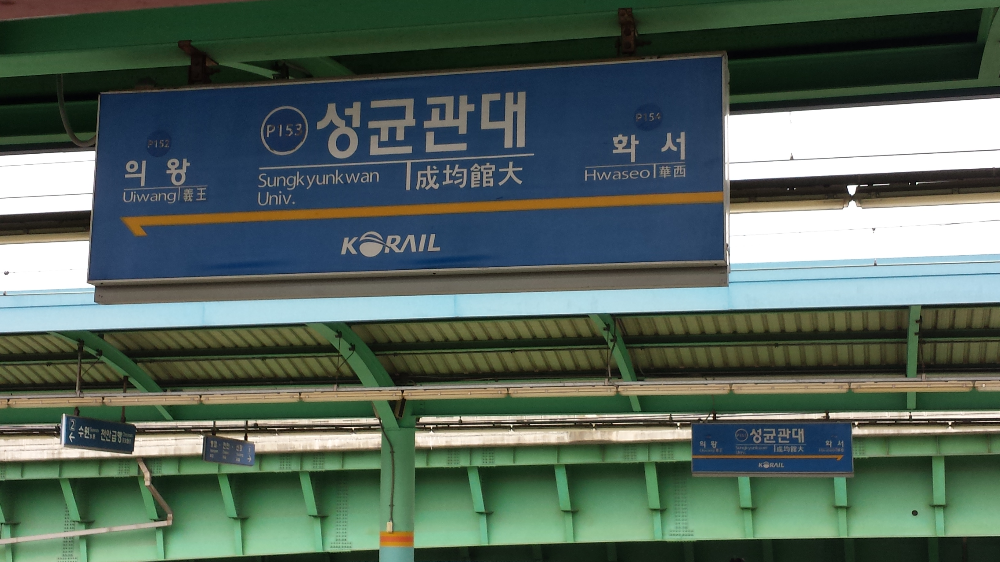 성균관대역 역멸판